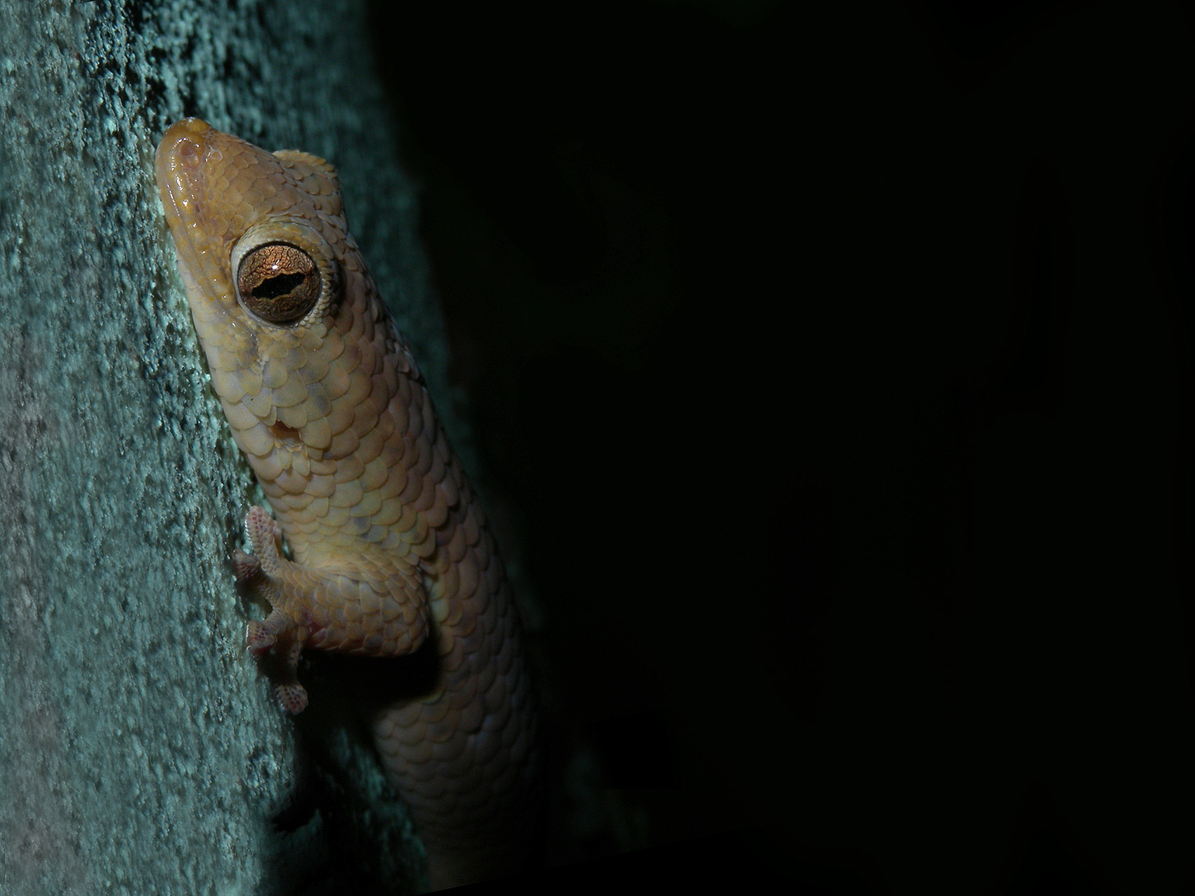 Fish-scale Gecko (Geckolepis sp.), Ankarafantsika National Park, Madagascar